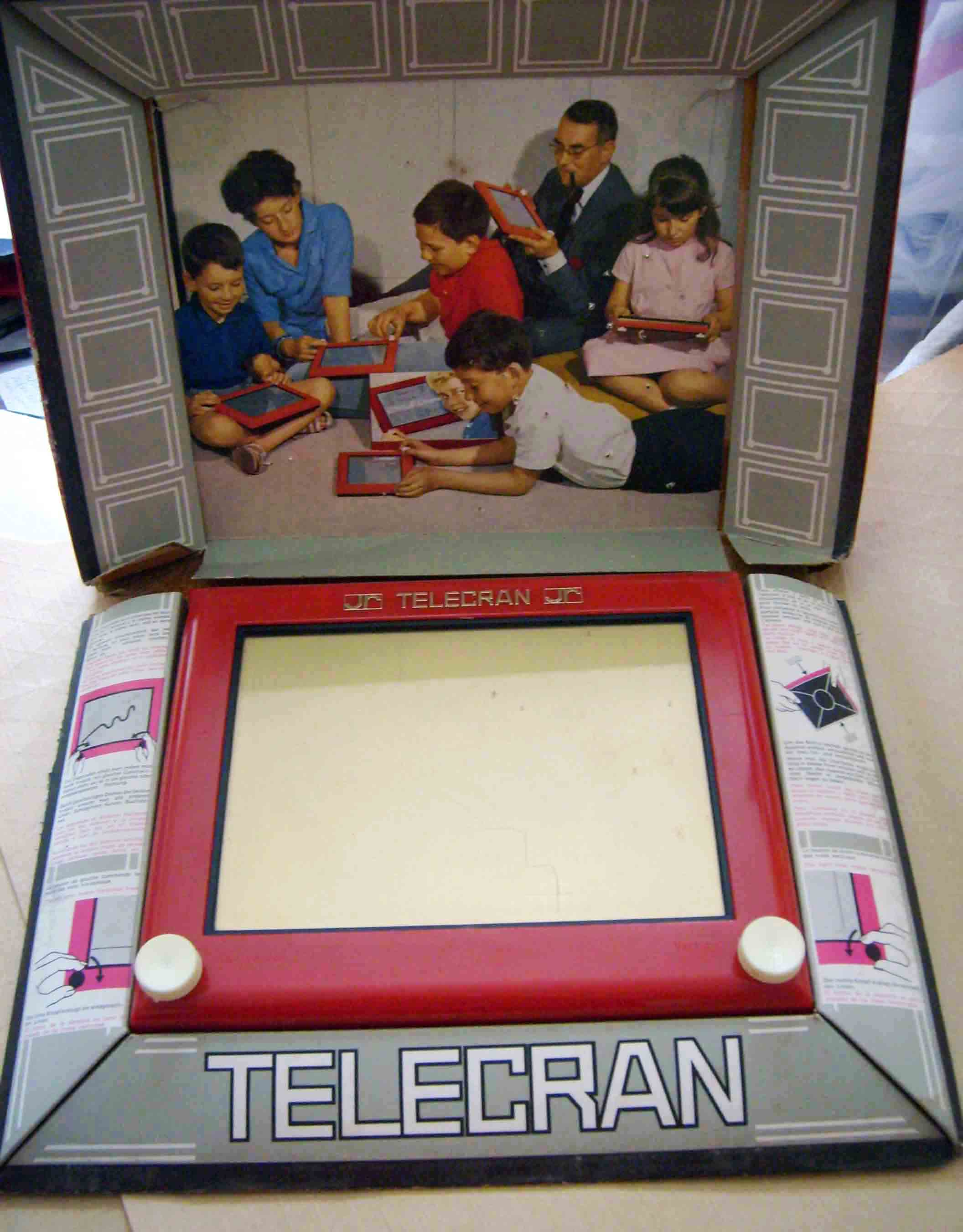 Intérieur de la boîte du Télécran, un jouet commercialisé par la société française Les Jouets Rationnels dans les années 60.